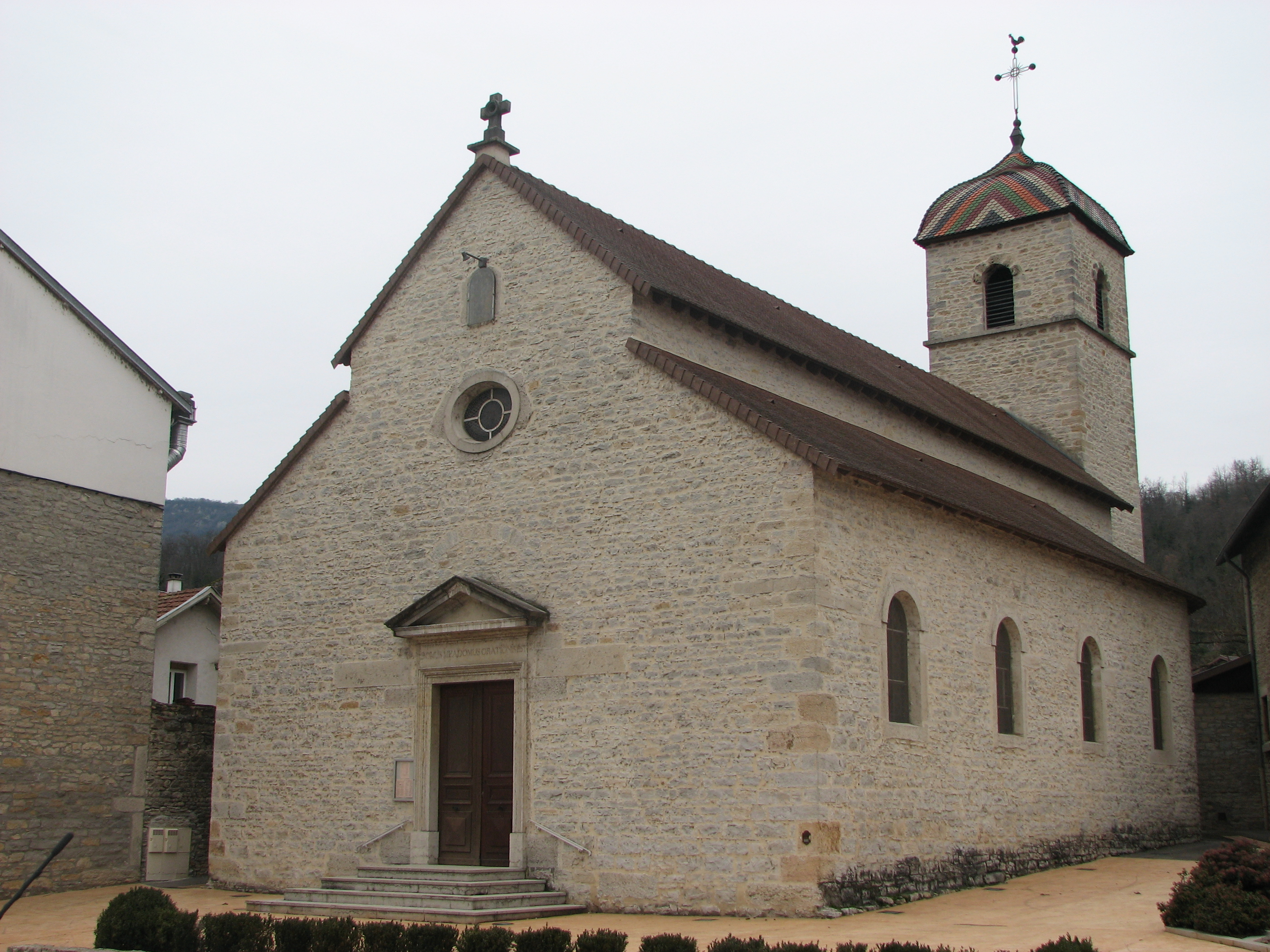 Église de Sault-Brénaz (Ain).